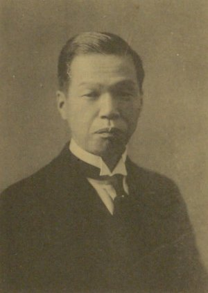 大西一郎（1887-1950）